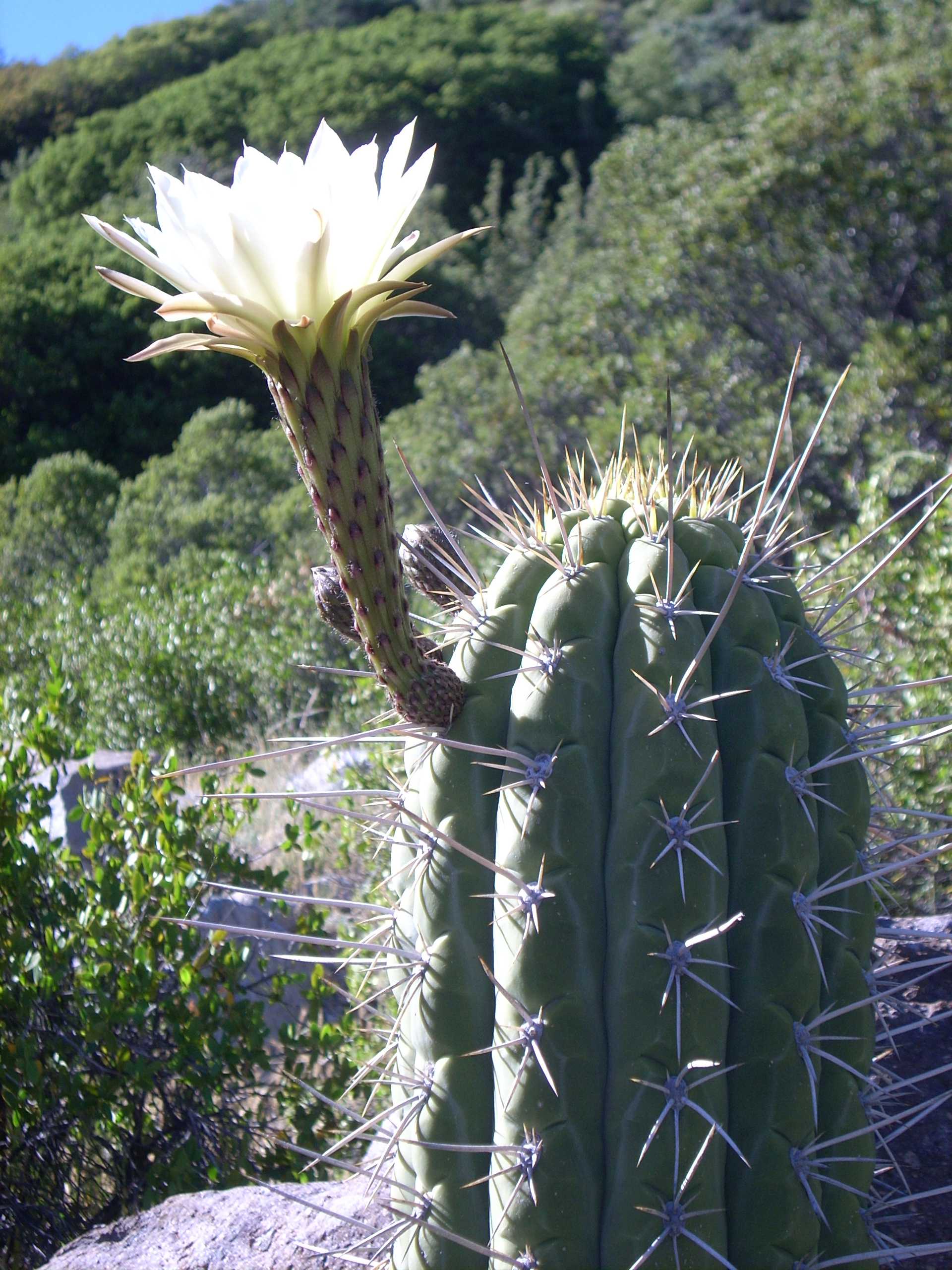 Echinopsis Chiloensis, Flor de Quisco. Reserva Nacional Río de los Cipreses, Provincia de Cachapoal, Región de O'Higgins. Chile